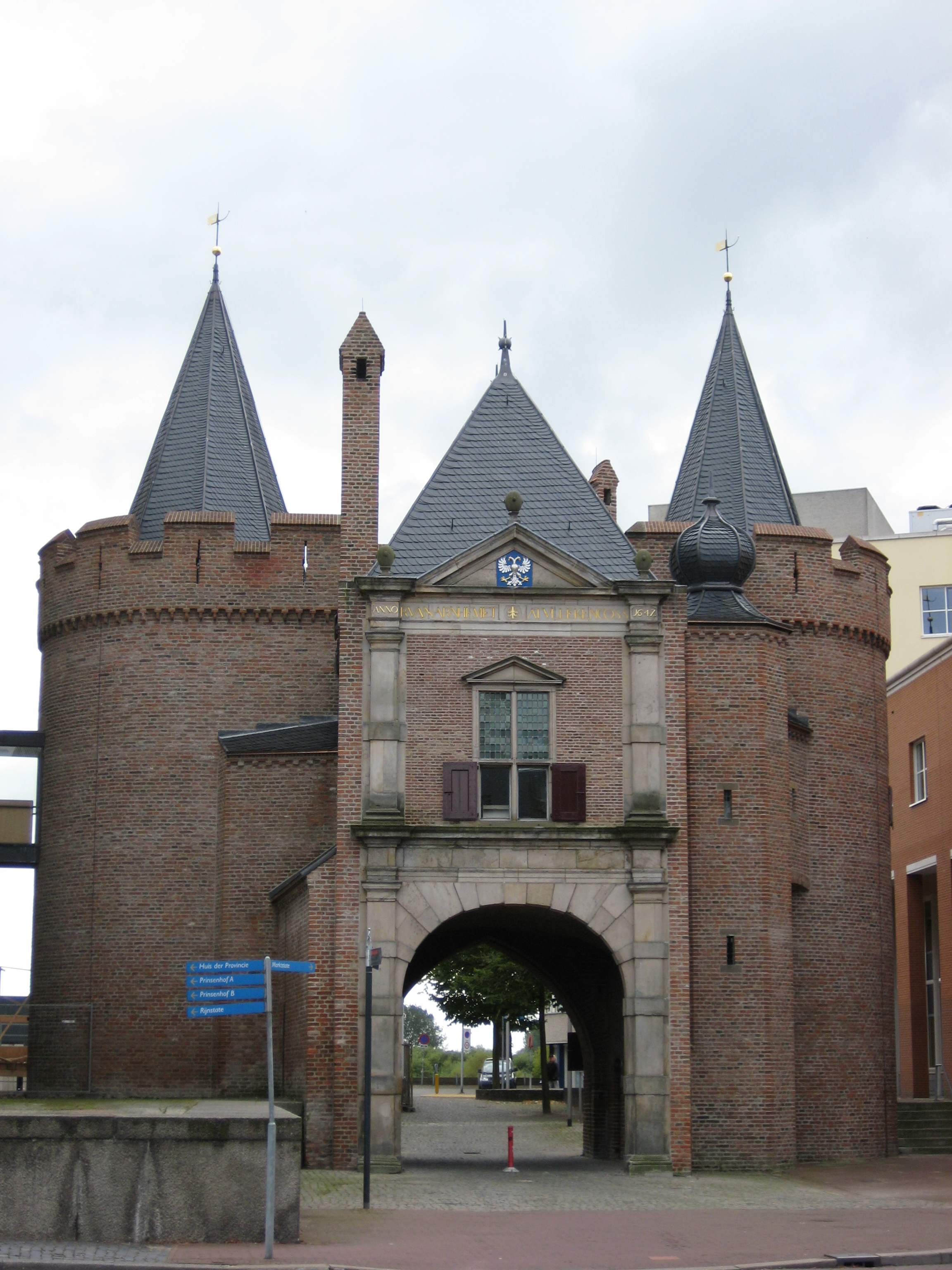 Sabelspoort in Arnhem (nld)